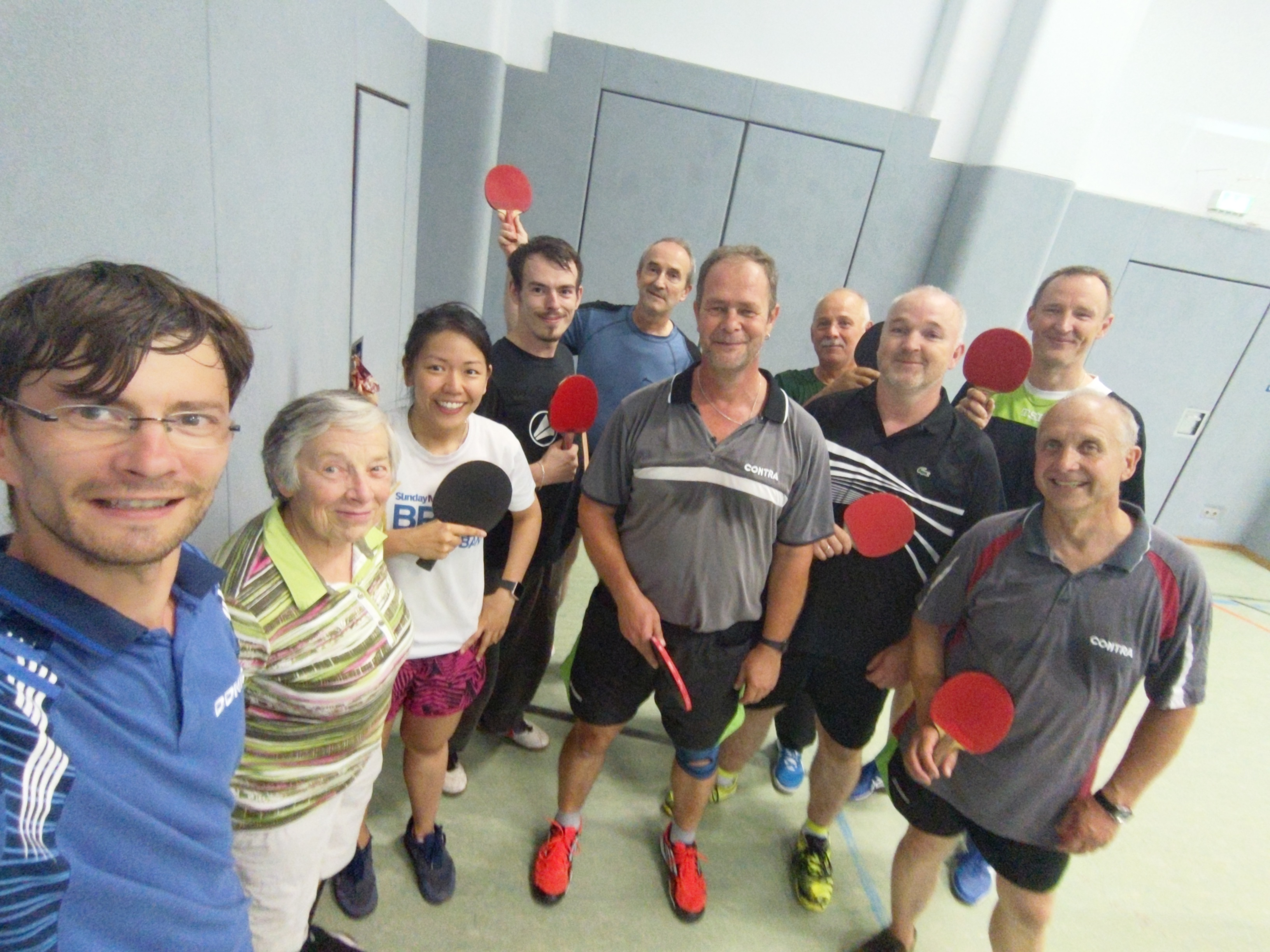 Das Foto zeigt einzelne Mitglieder und zwei Gäste (erster von links, dritte von links) der Tischtennisabteilung des Rheinsberger Sportvereins im Juli 2019.